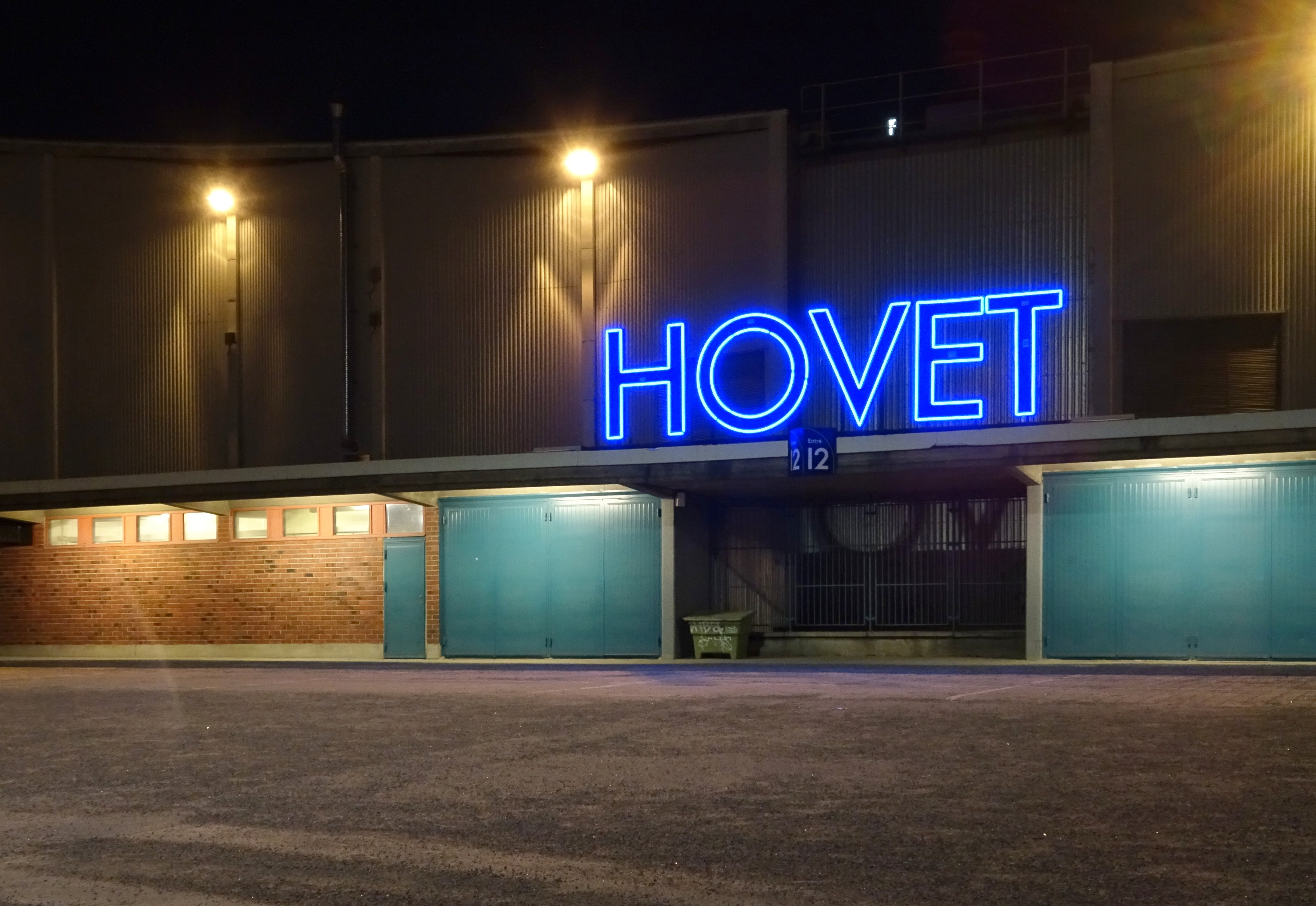 Hovet, arenan i Johanneshov, entré